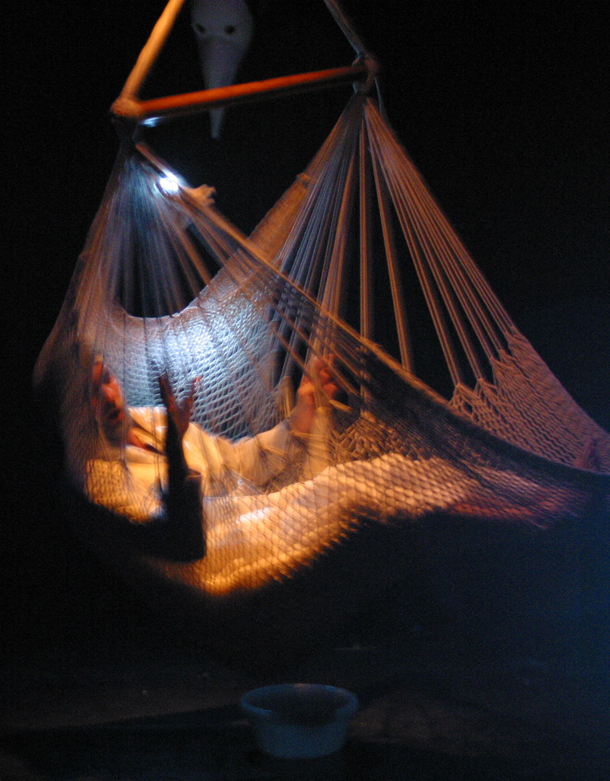 Le cauchemar d'Argan, extrait du spectacle